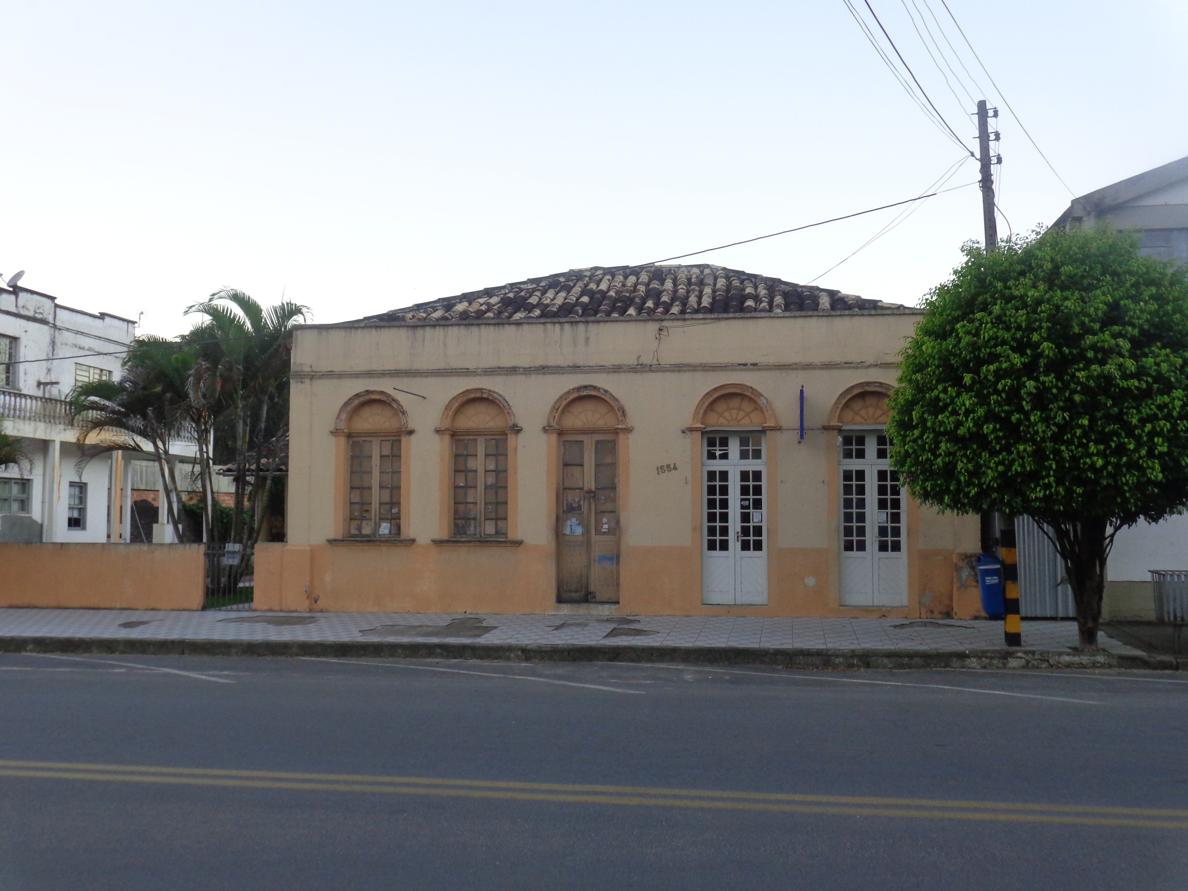 Casa construída em 1910, localizada na Praça Coronel Collaço, Braço do Norte